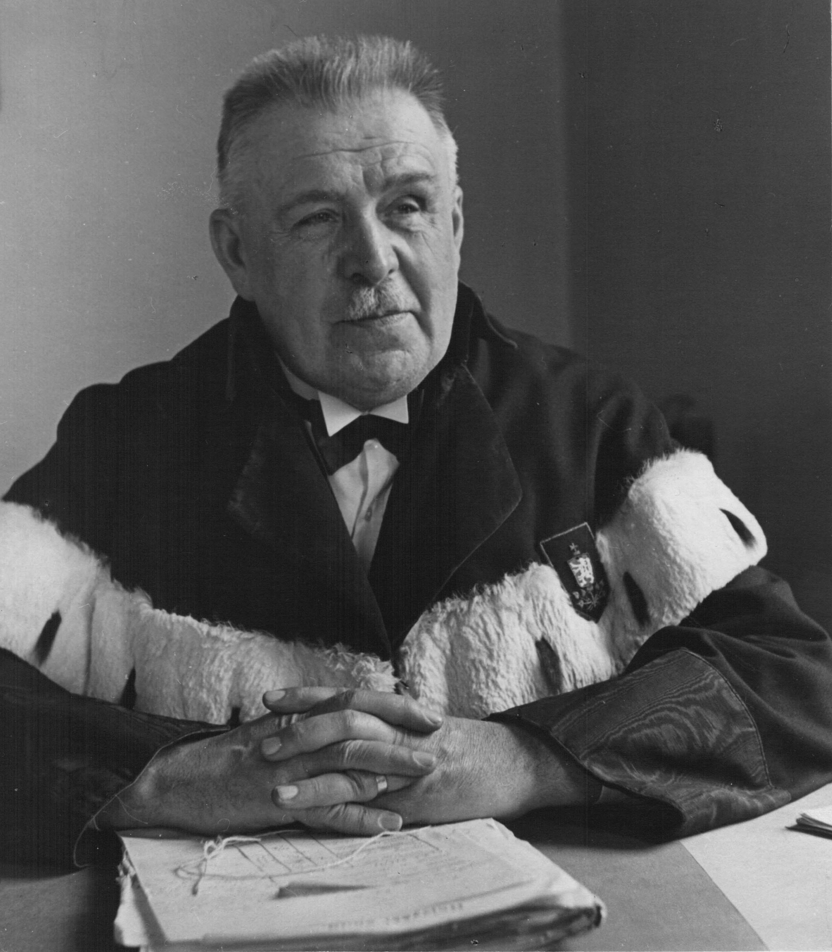 portrét z konce 30. let